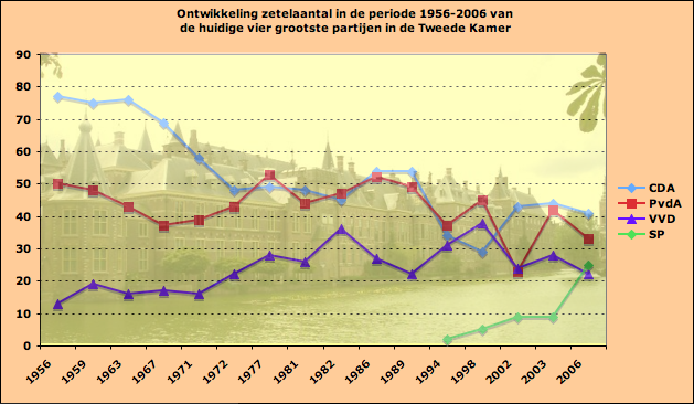 Ontwikkeling zetelaantal huidige vier grootste partijen 1956-2006